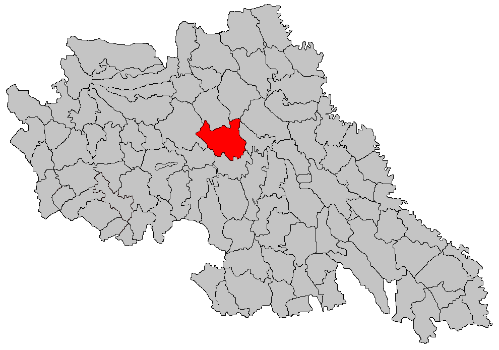 Categorie:Hărţi ale judeţului Iaşi